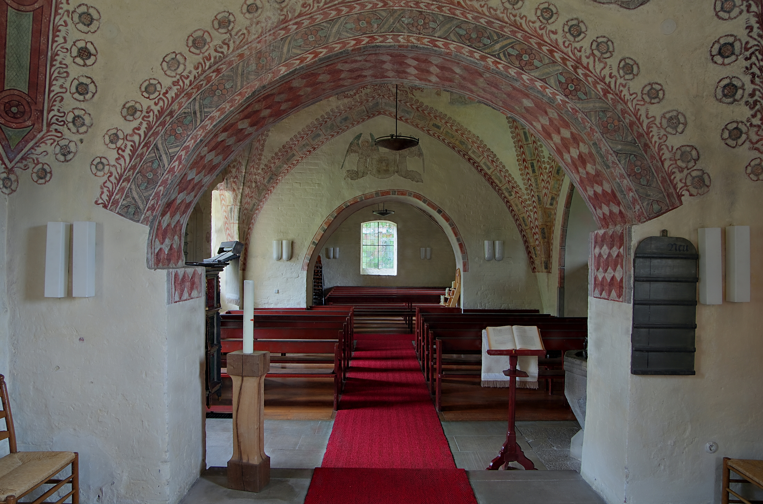 Die Kirche zu Scholen ist eine evangelische Kirche in der niedersächsischen Gemeinde Scholen. Blick vom Chor.